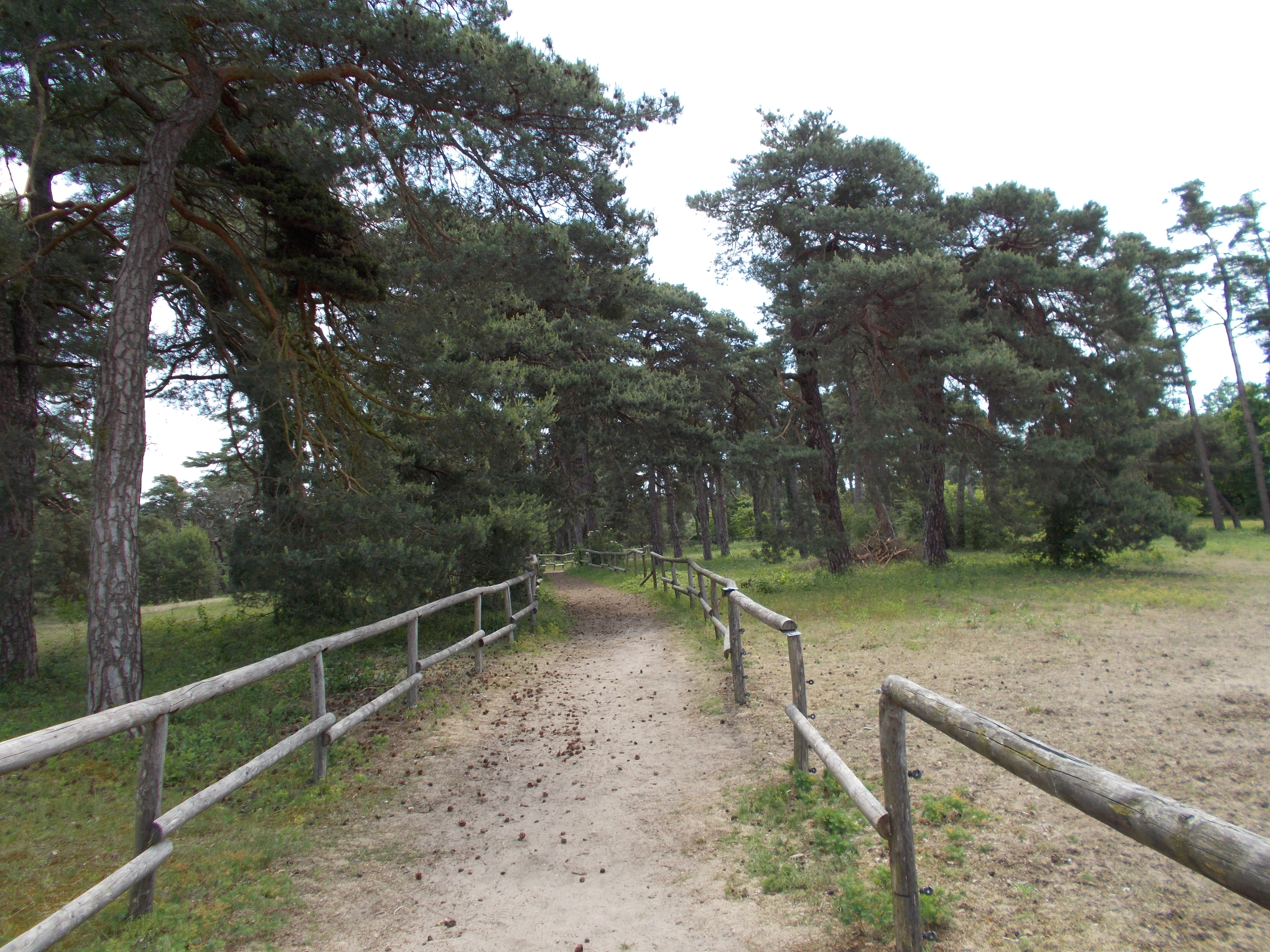 Naturschutzgebiet Sandhausener Dünen (NSG 2014), Pferdstrieb Süd, Blick auf lichten Kiefernwald auf dem Dünenkamm, Einzäunung zur Besucherlenkung